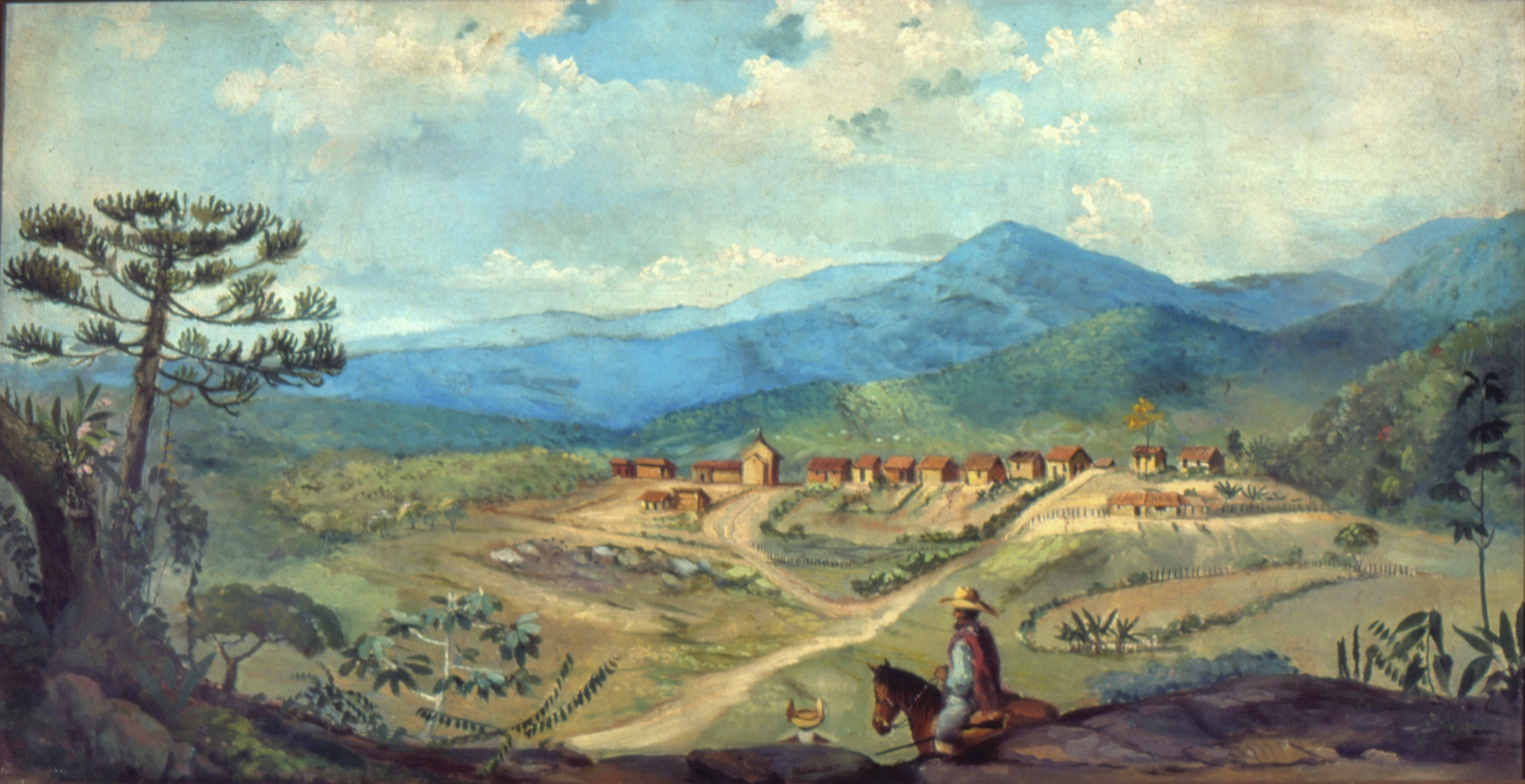 Obra que integra o acervo do Museu Paulista da USP.